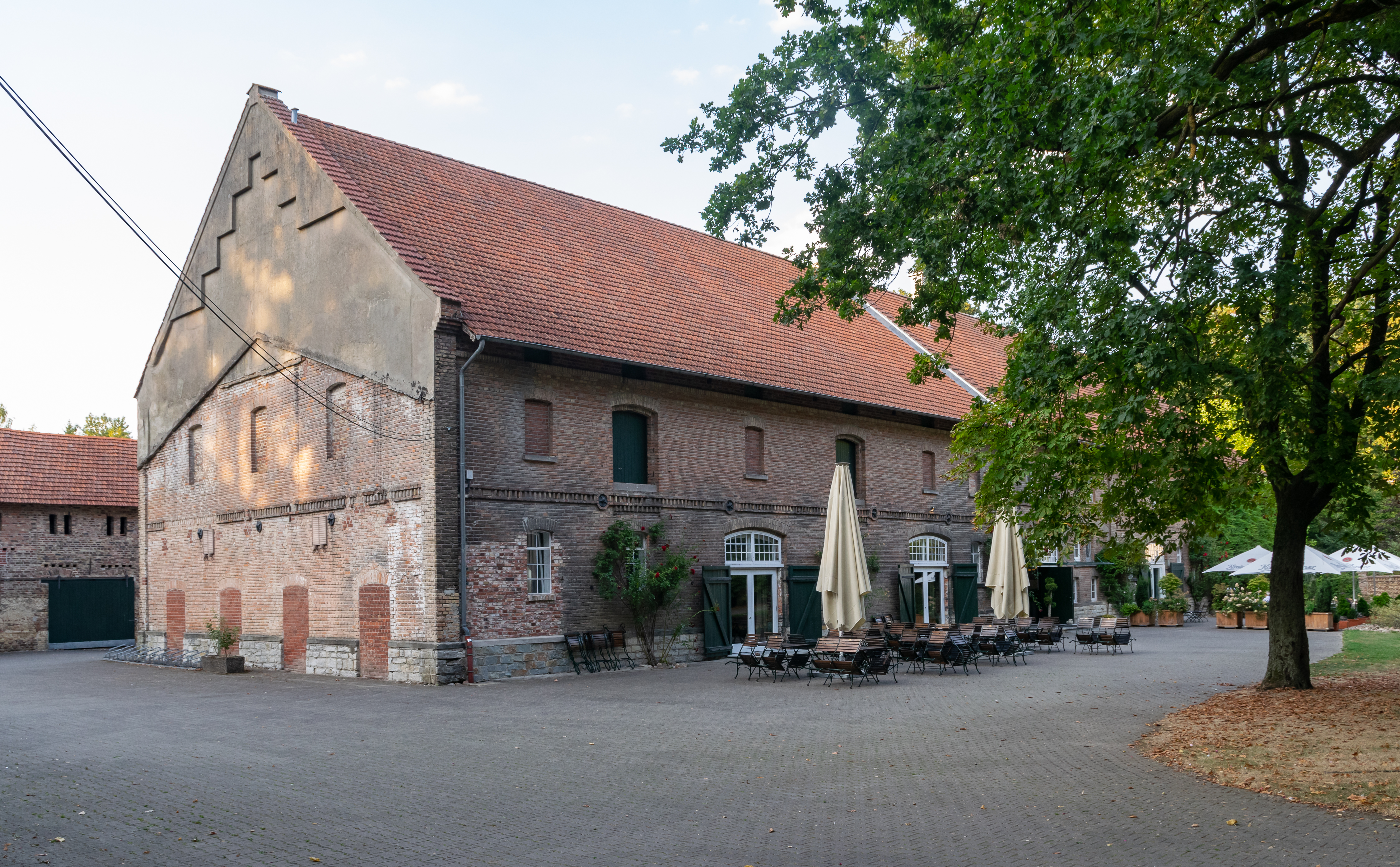 Wirtschaftsgebäude von Gut Ringelsbruch in Paderborn-Elsen